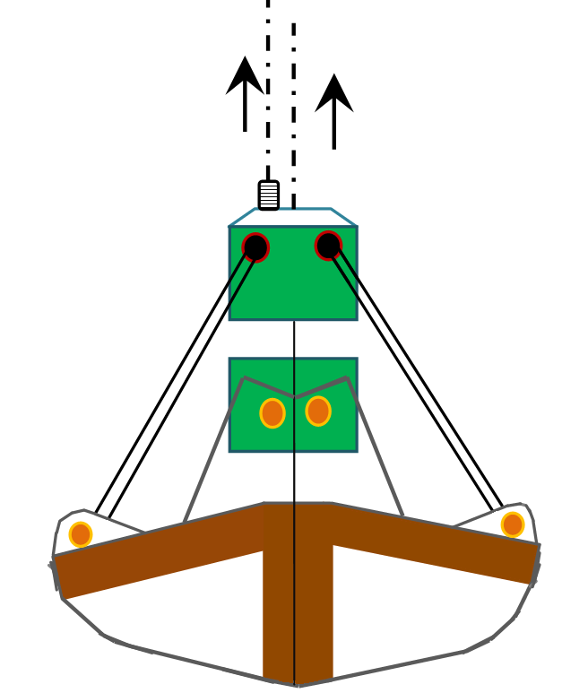 2х-канатный грейфер - операция 4